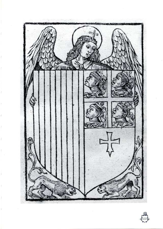 Fueros del Reino de Aragón (1496) Incunable editado por Pablo Hurus.